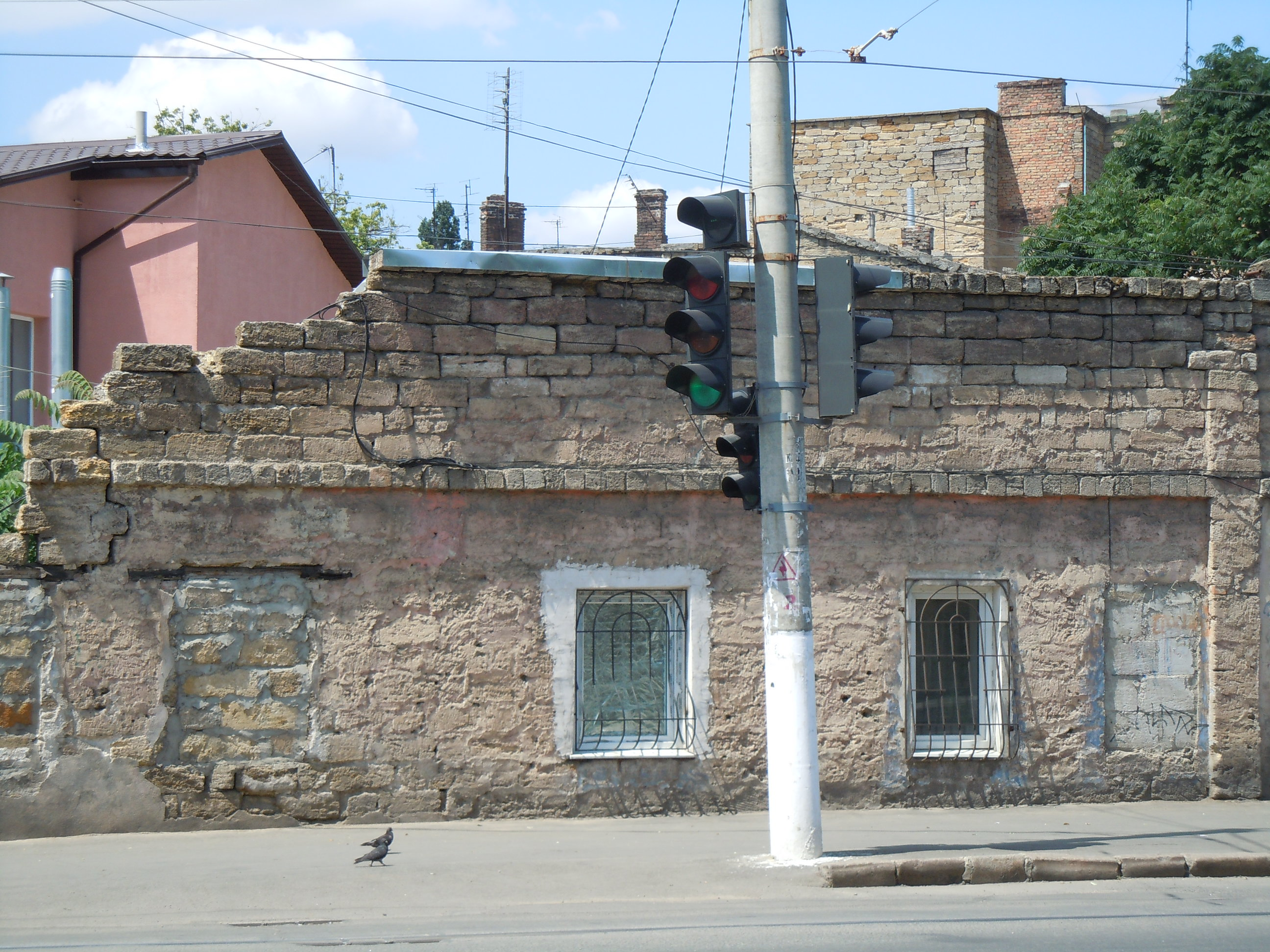 Типові будинки на Молдаванці, Одеса